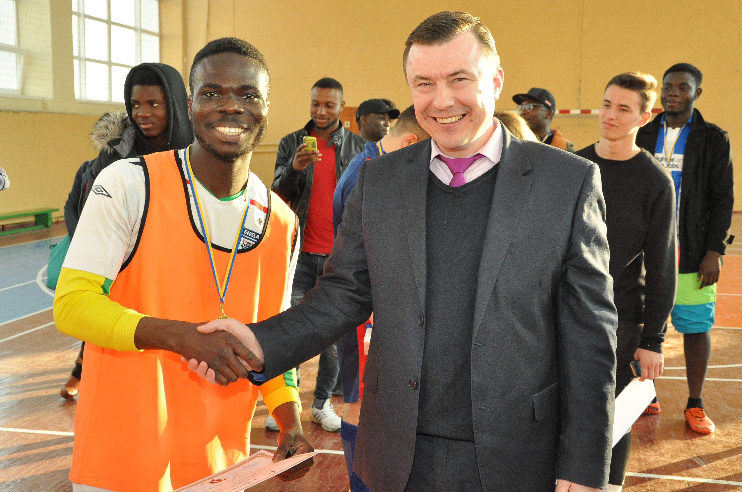 Міні-футбол «Ліга чемпіонів» Тернопільського державного медичного університету імені І. Я. Горбачевського. Півфінальні та фінальний поєдинки 26 квітня 2016 року. Нагороди вручає декан факультету іноземних студентів Петро Сельський.